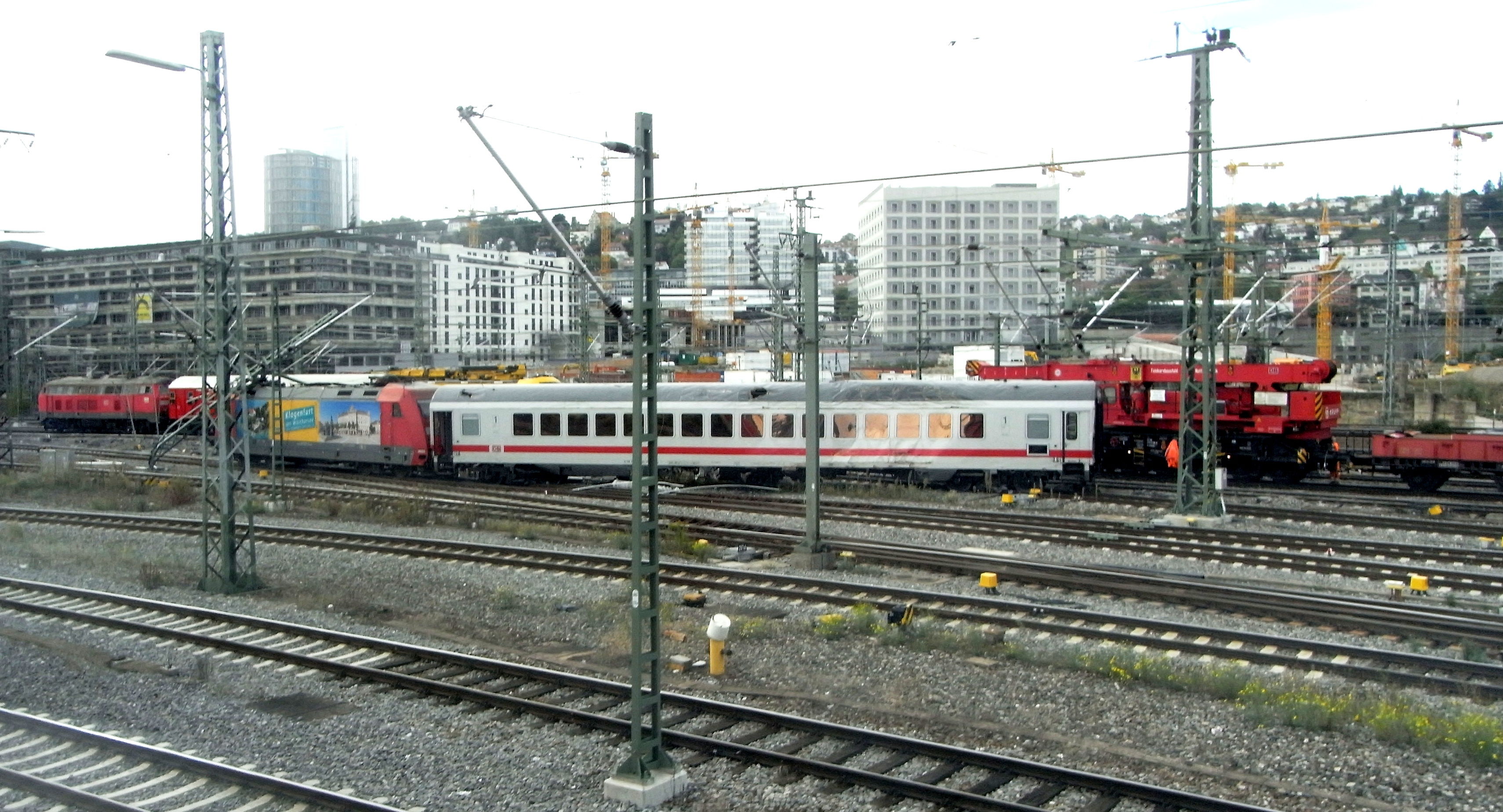 Entgleister IC 2312 auf dem Vorfeld des Stuttgarter Hauptbahnhofs.